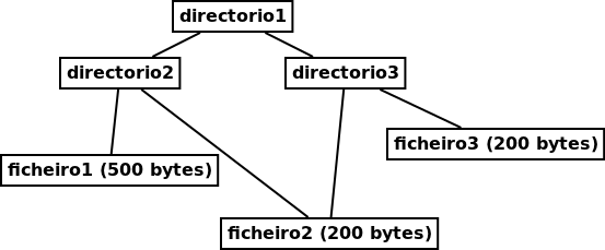 Exempo dun diagrama coa estructura do composite modificado, de forma que varios compostos comparten unha folla